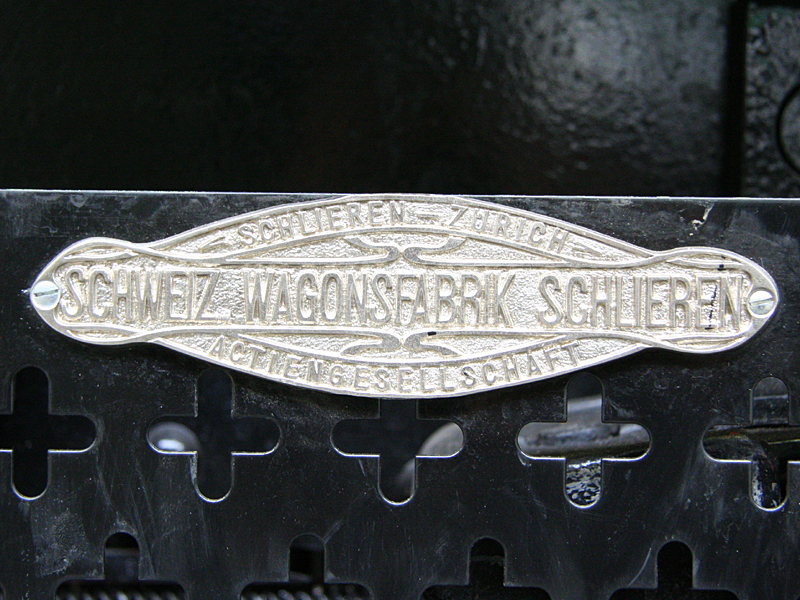 Plakette der Wagi Schlieren an einem historischen Tramwagen Ce 2/2 ("Lisbethli") im Tram-Museum Zürich